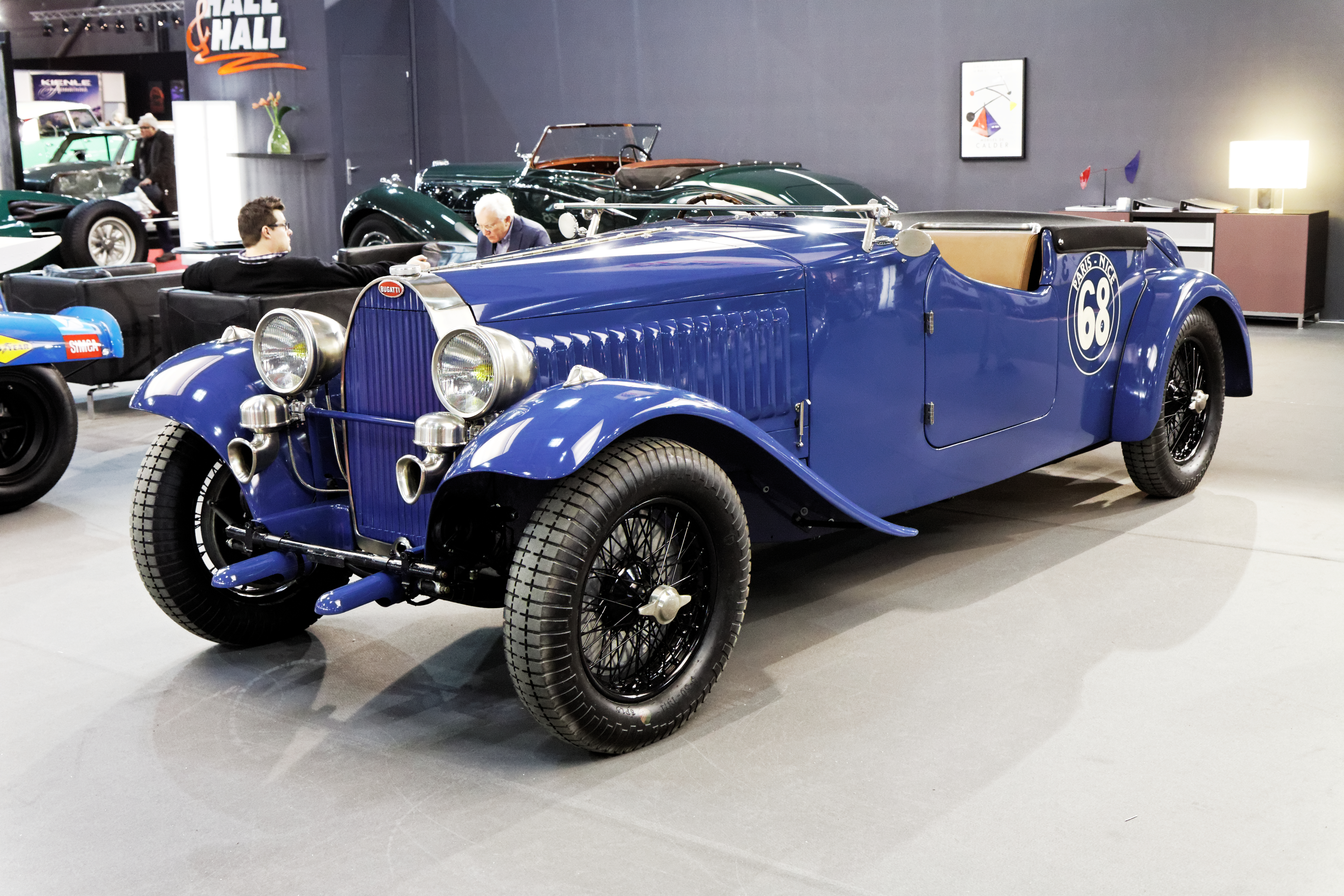 Une Bugatti T57 présentée lors du salon Retromobile 2013.